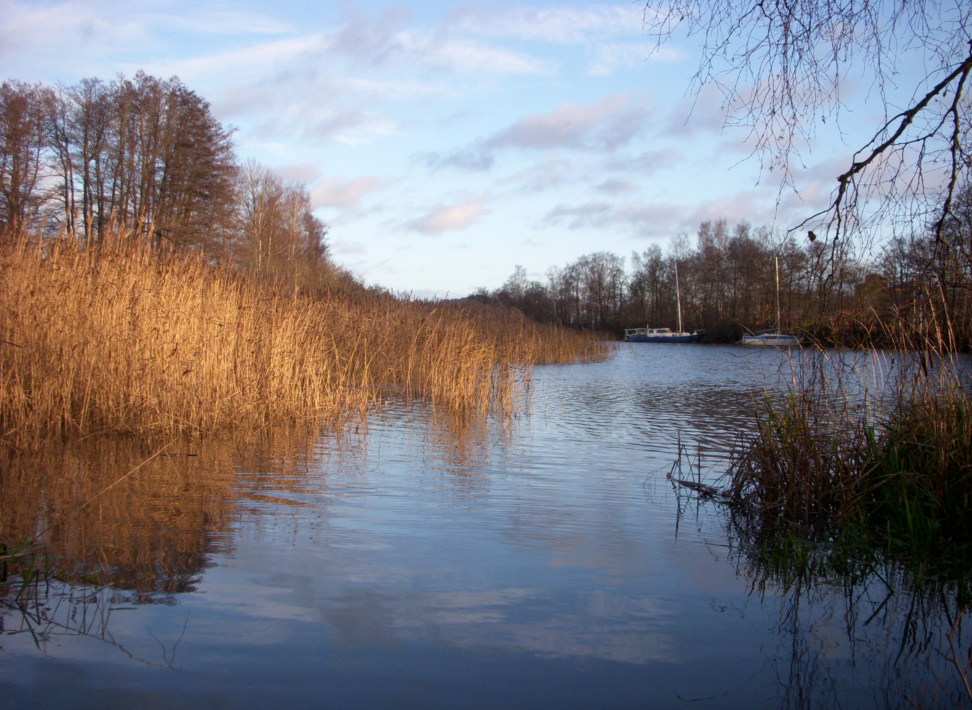 Husarviken på Norra Djurgården